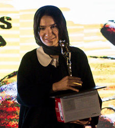 نوشین جعفری در دومین جشن انجمن عکاسان سینمای ایران باغ موزه قصر ۲۴ اردیبهشت ۱۳۹۵